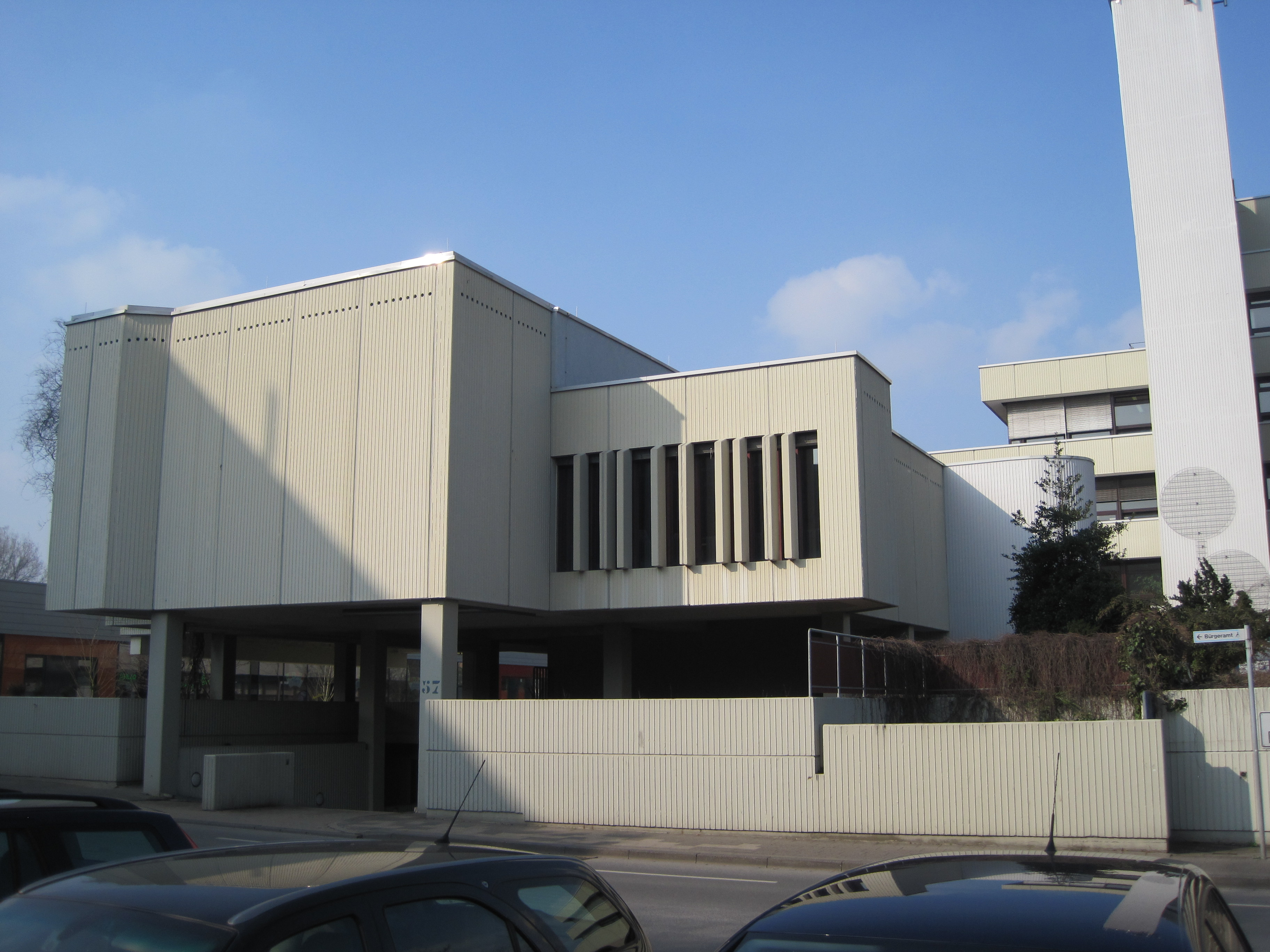 Das Foto zeigt den linken Teil des Rathauses von Bockum-Hövel mit Blick von der Rautenstrauchstraße.